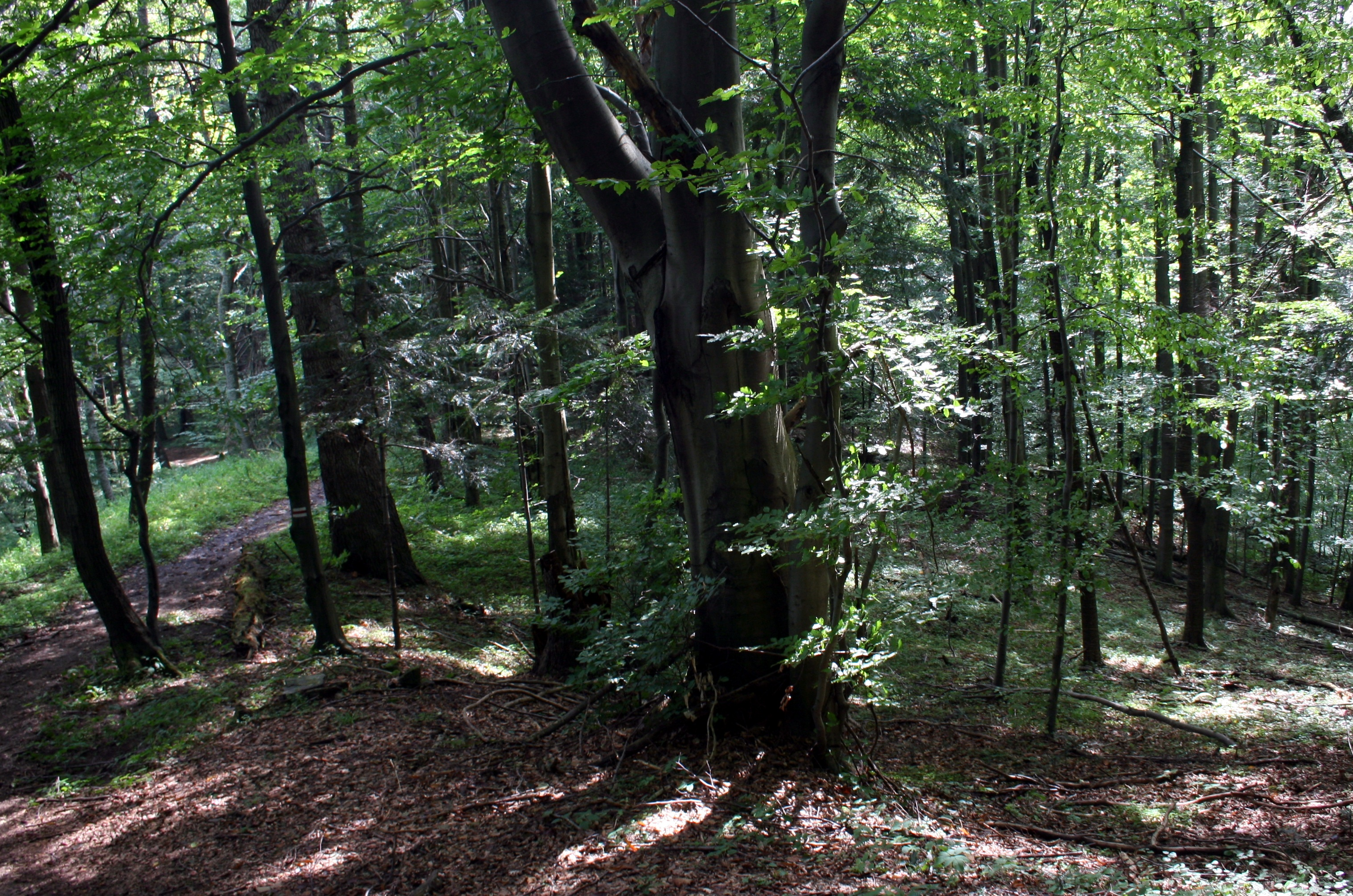 Las na czerwonym szlaku prowadzącym z miejscowści Komańcza do Prełuków, woj. podkarpackie